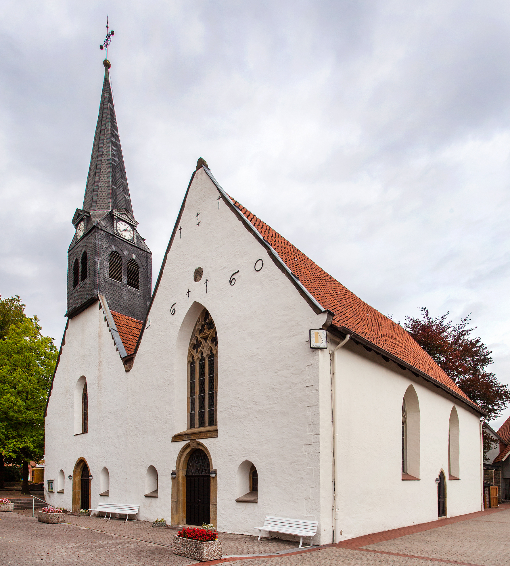 St. Stephanskirche in Vlotho This is a photograph of an architectural monument.